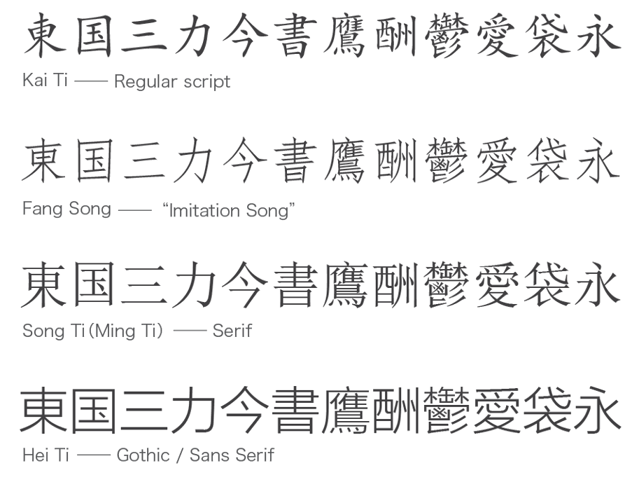 Comparaison des styles chinois